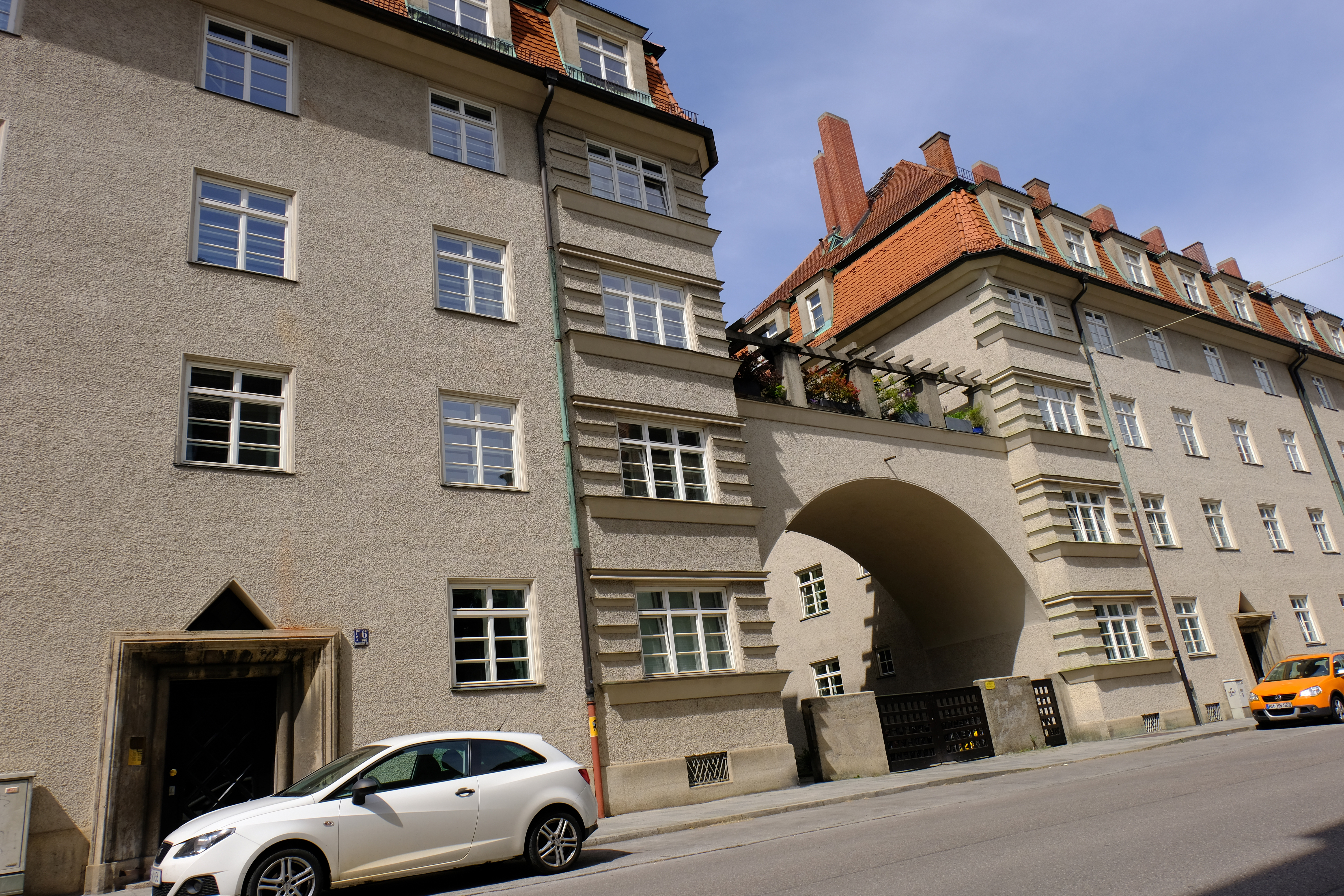 Gebäude an der Lindenschmitstraße 56, erbaut um 1927 nach den Entwürfen von Otho Orlando Kurz und Eduard Herbert